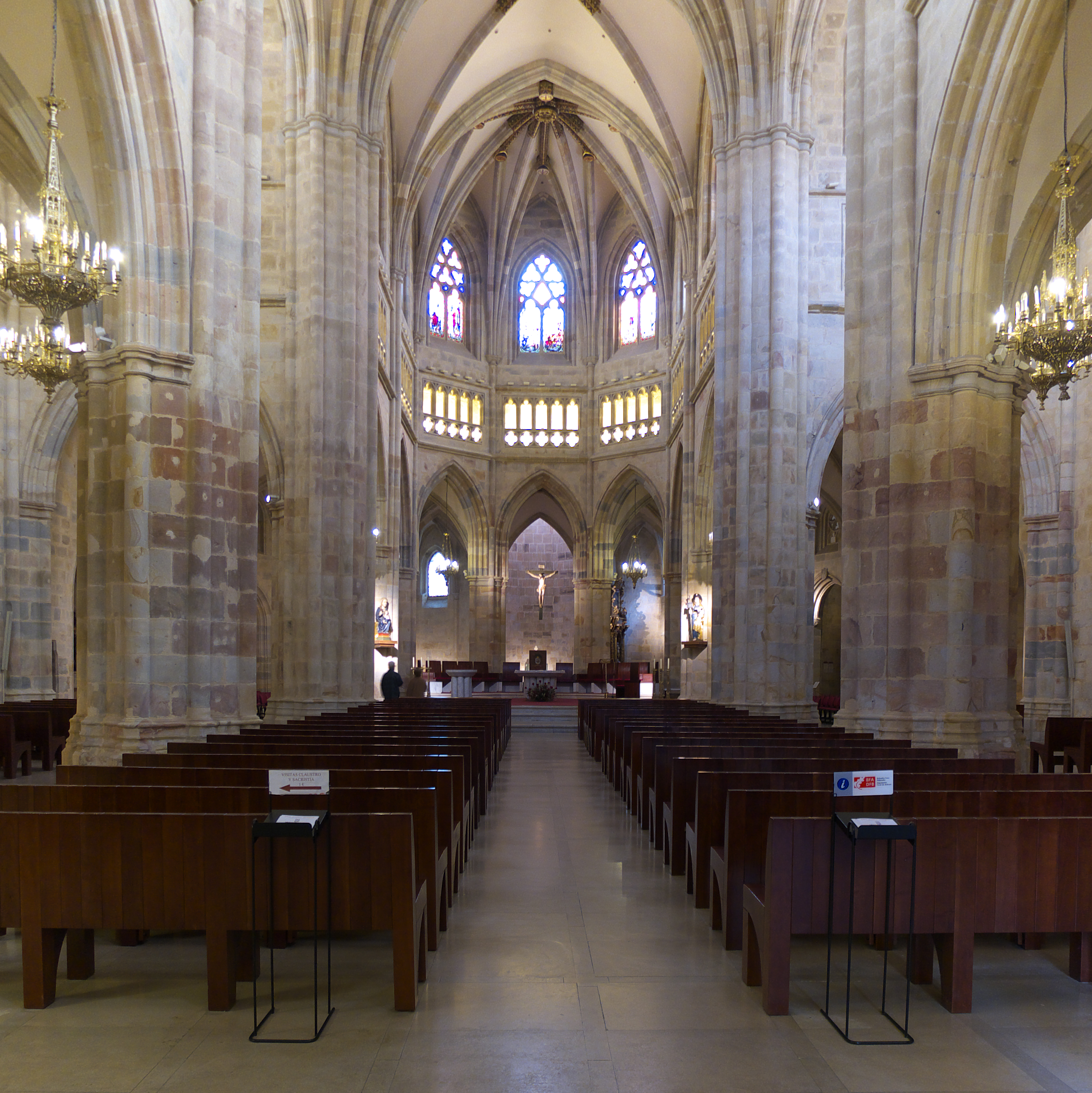 En el siglo XV se inicia la obra nueva de catedral por la pérdida de la fábrica anterior, debida a un importante incendio.